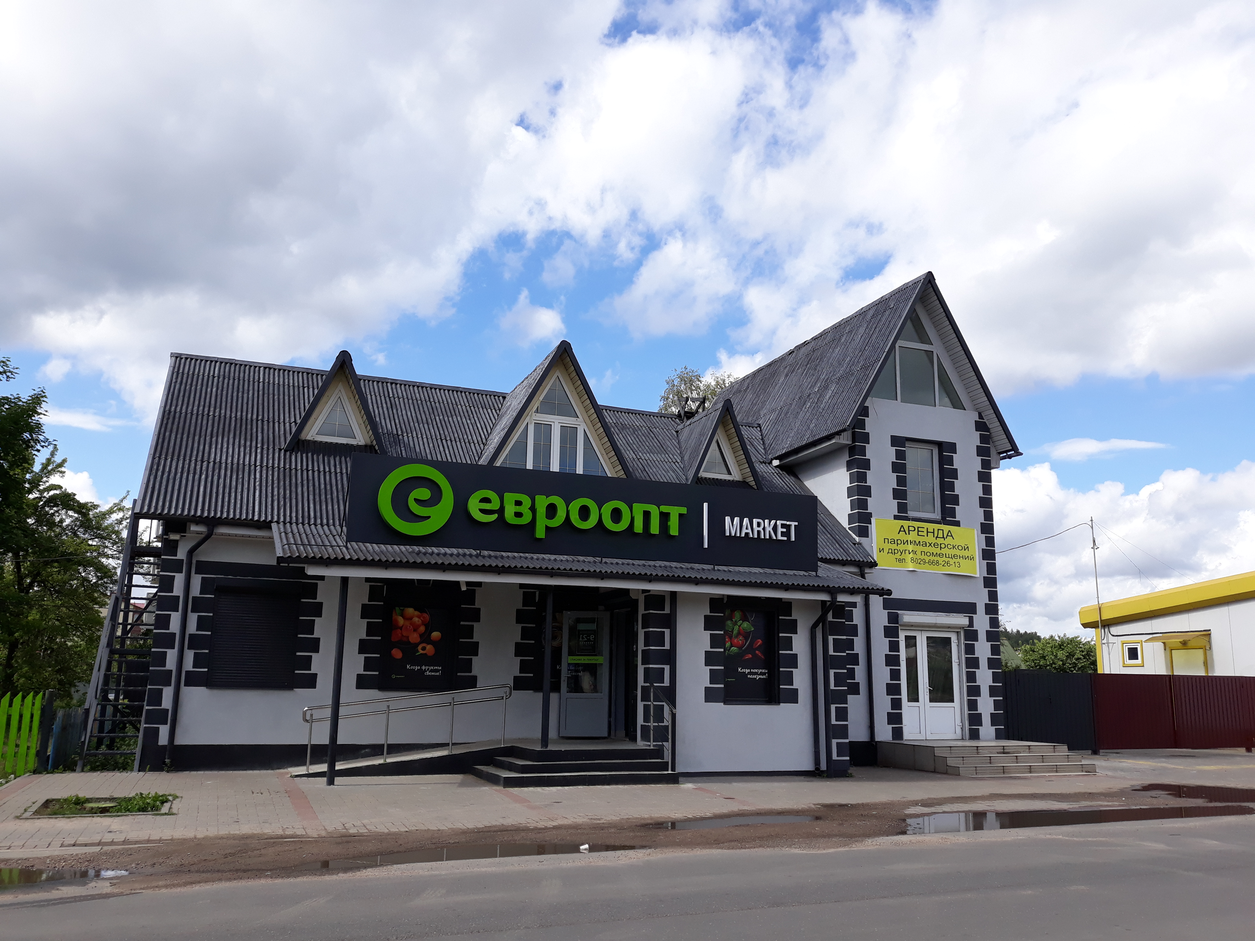 Калодзішчы. Мінскі раён. краявіды